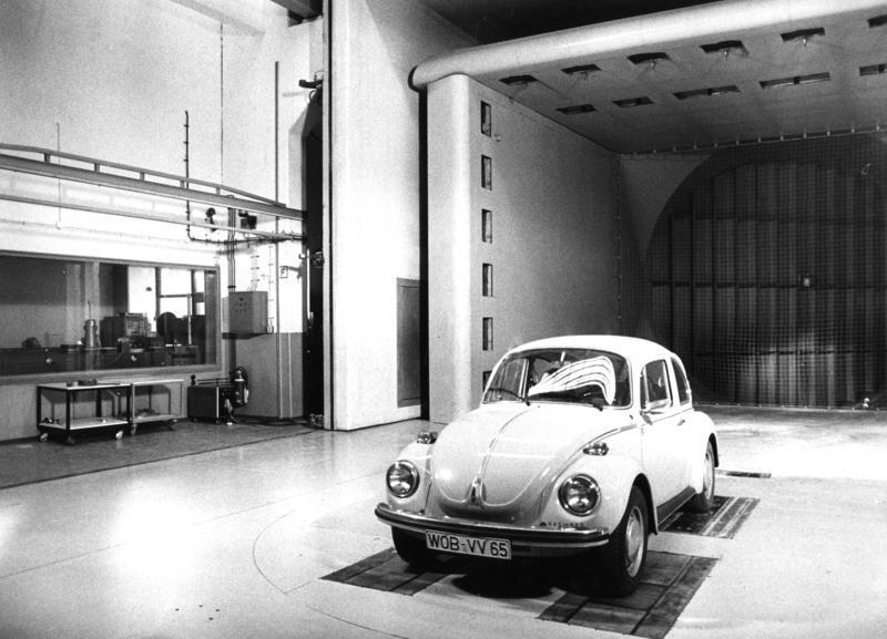 VW-Werk, Wolfsburg Forschung und Entwicklung Fahrzeug im Klimawindkanal, Messungen des aerodynamischen Verhaltens, Heizungs- und Belüftungseigenschaften bei unterschiedlichen Klimabedingungen